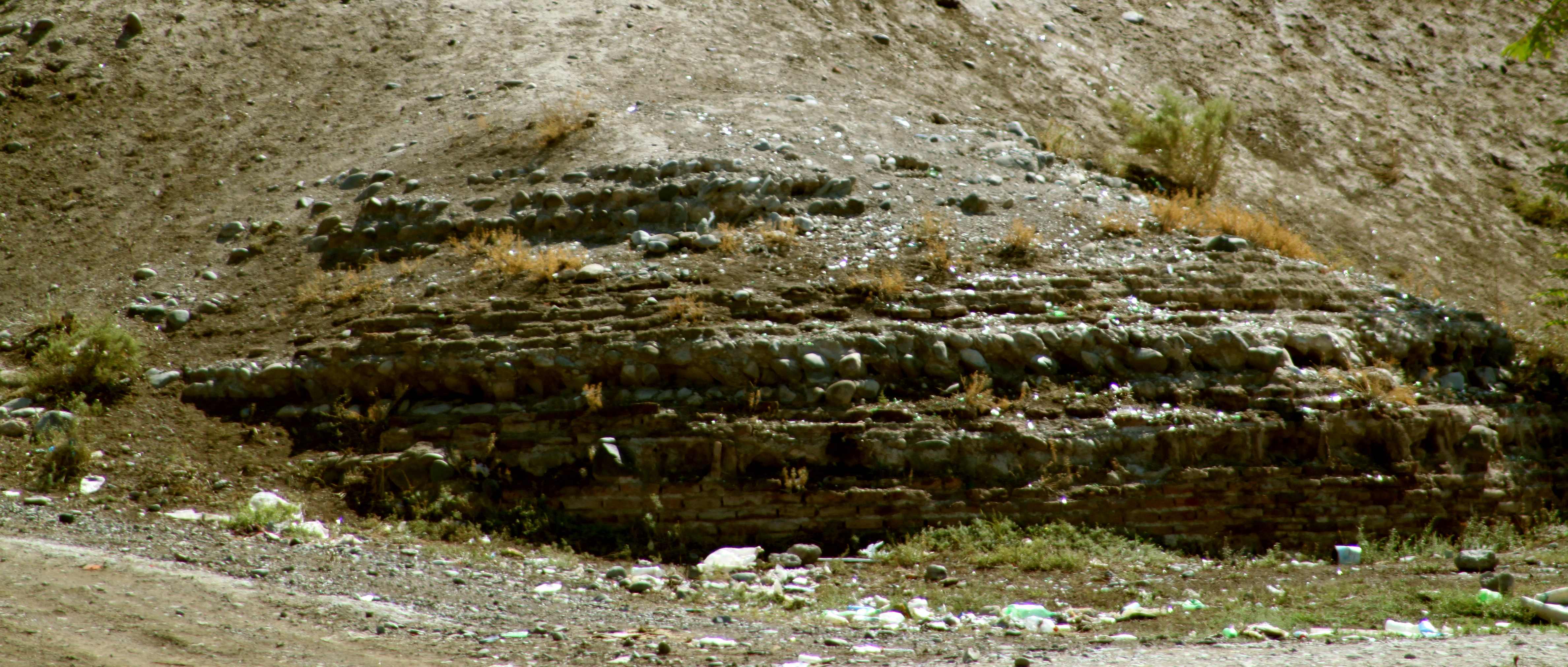 Qala bürcü